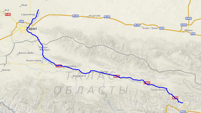 carte réalisée sur umap This map may be incomplete, and may contain errors. Don't rely solely on it for navigation.